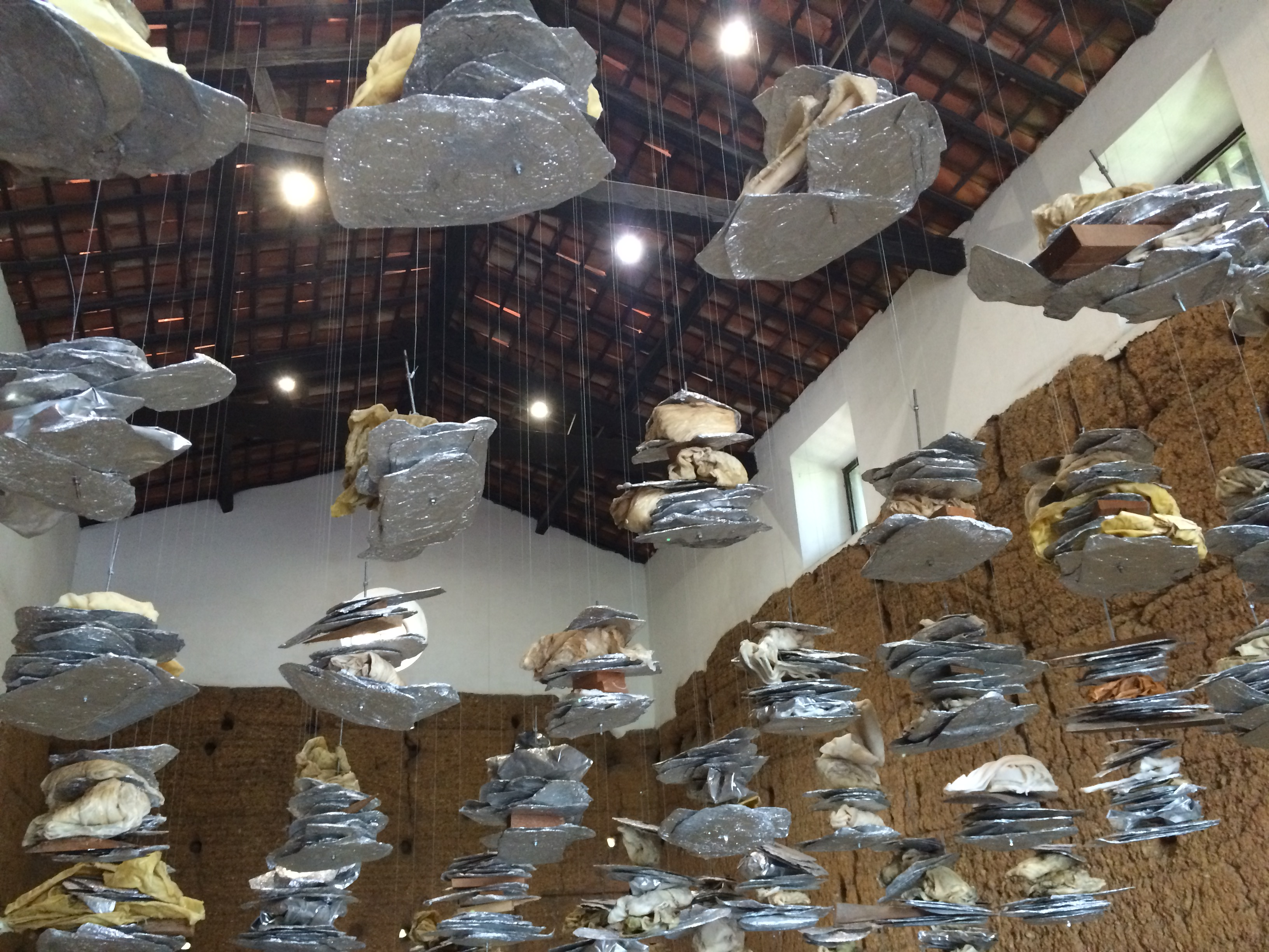 Detalhes da exposição de Carmela Gross na sala principal da Capela do Morumbi, em São Paulo (SP), Brasil.